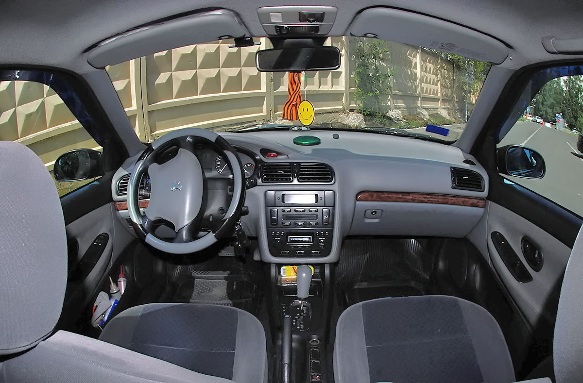 Peugeot 406. Cockpit.